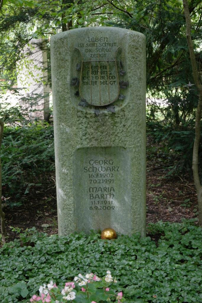 Grab des Schriftstellers Georg Schwarz, 1902-1991, auf dem Waldfriedhof in München-Solln